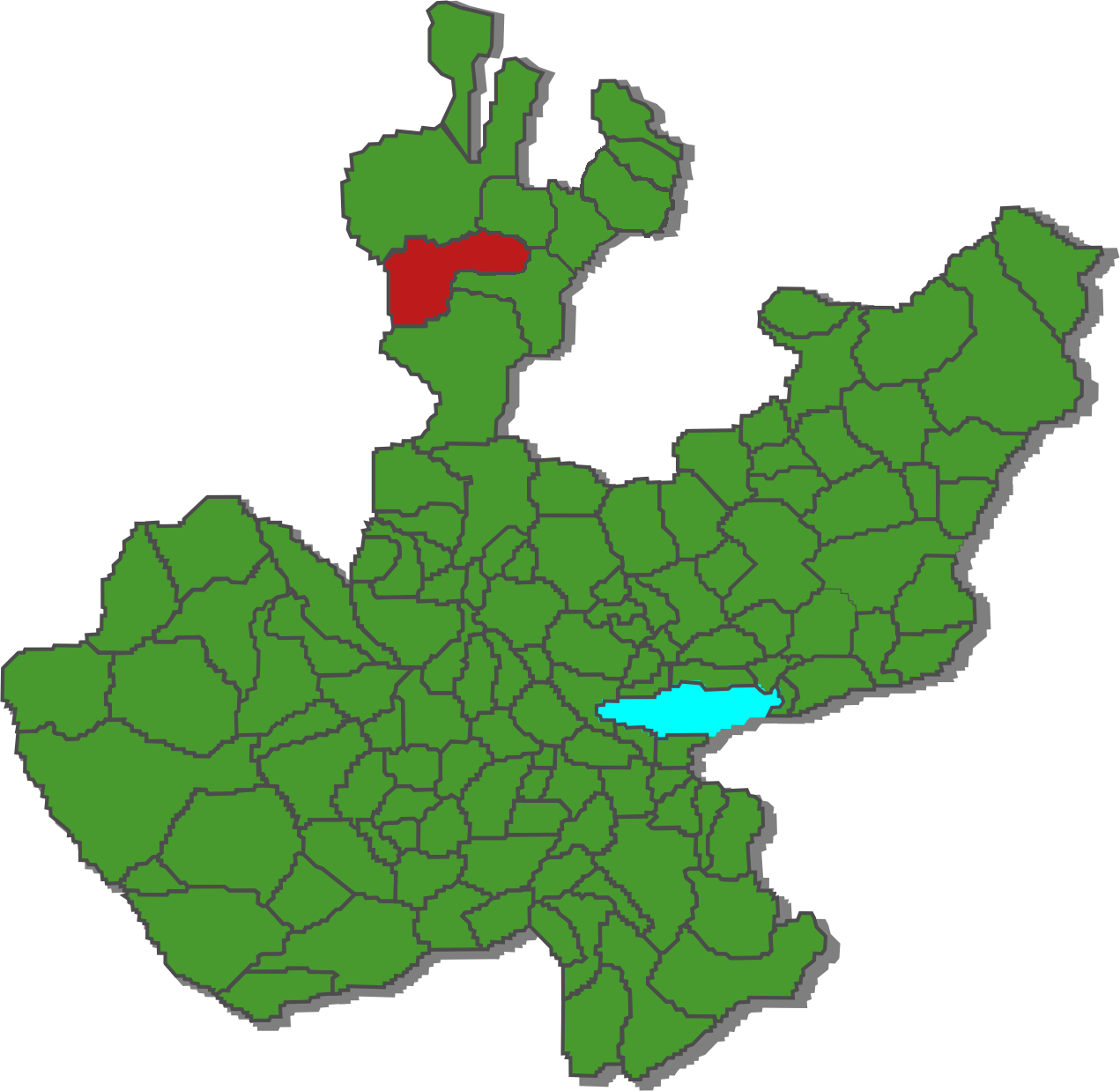 Ubicación del municipio de Bolaños en el mapa de Jalisco.